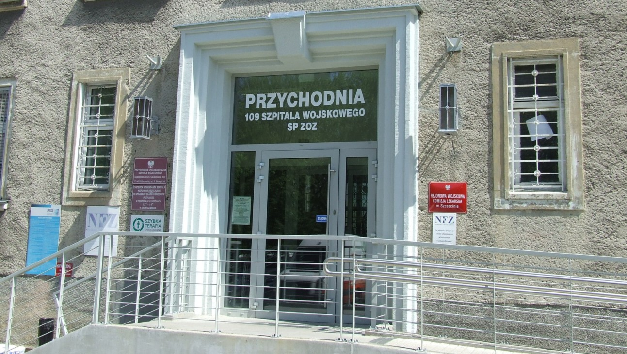 Przychodnia 109 Szpitala Wojskowego